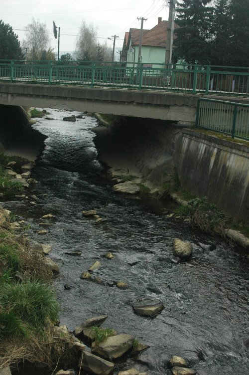 Lehotský potok in Nováky